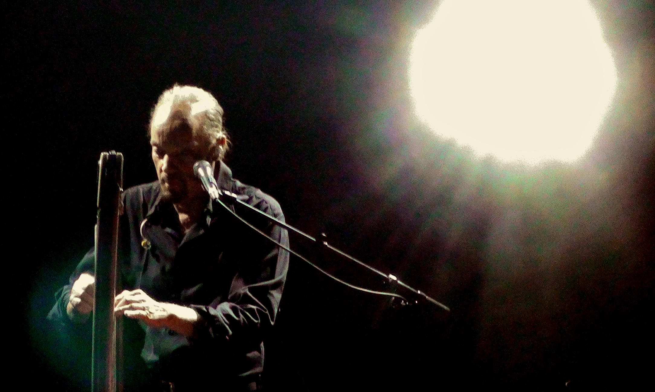 Alan Stivell en concert à la Carène à Brest le 13 octobre 2012.